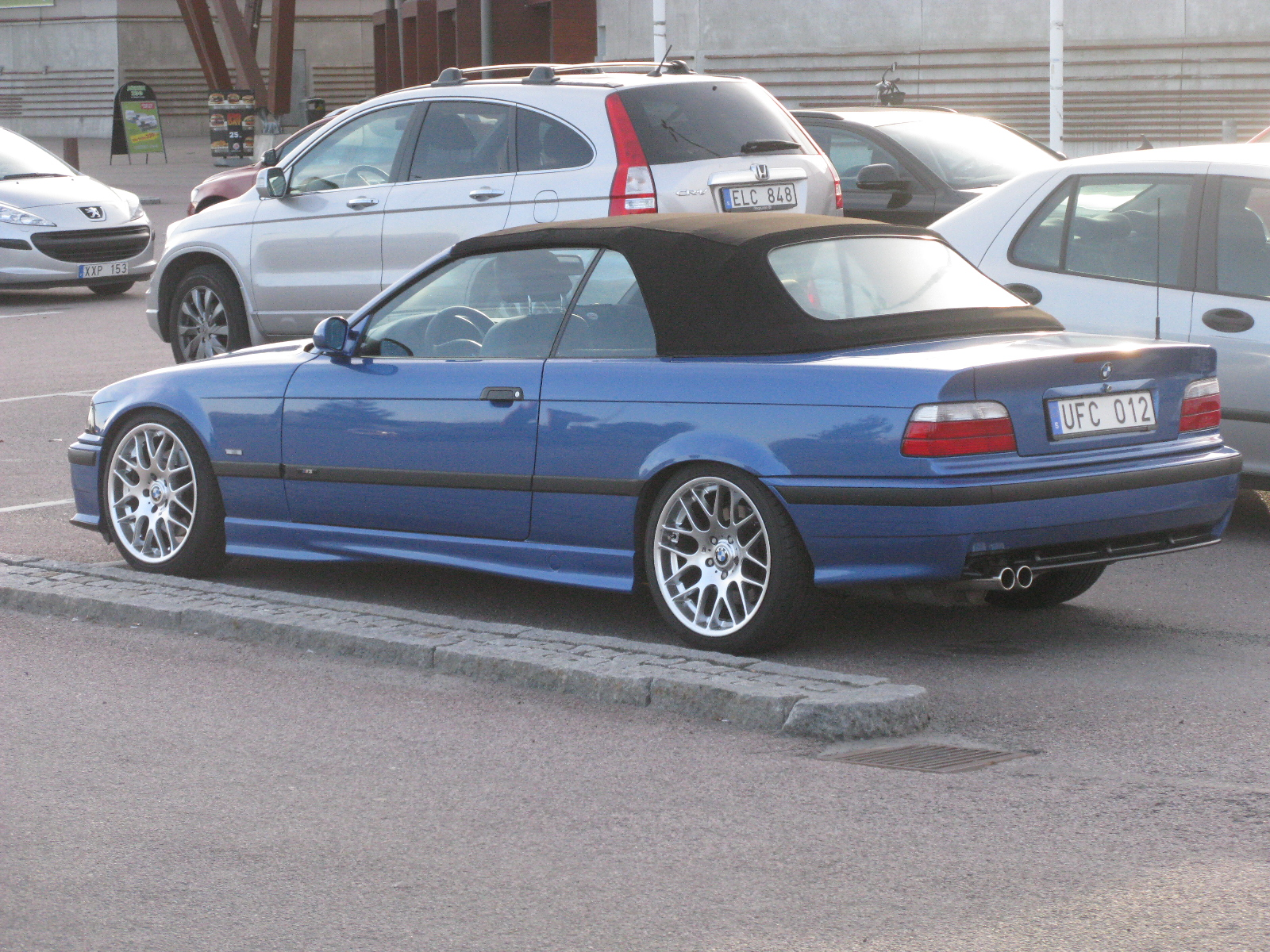 BMW M3 Cabriolet E36